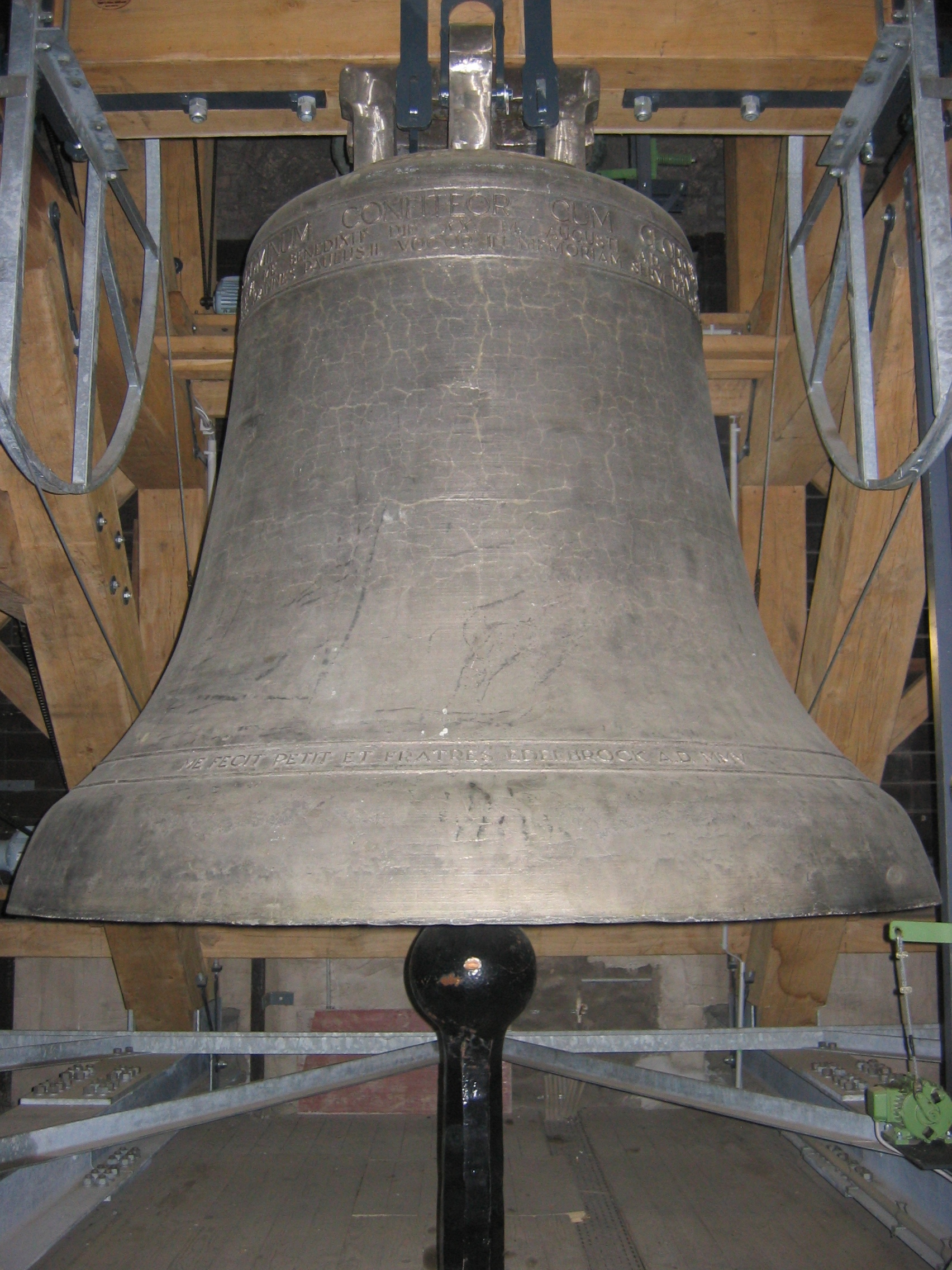 Papstglocke „Johannes Paul II“. St. Aposteln, Köln.